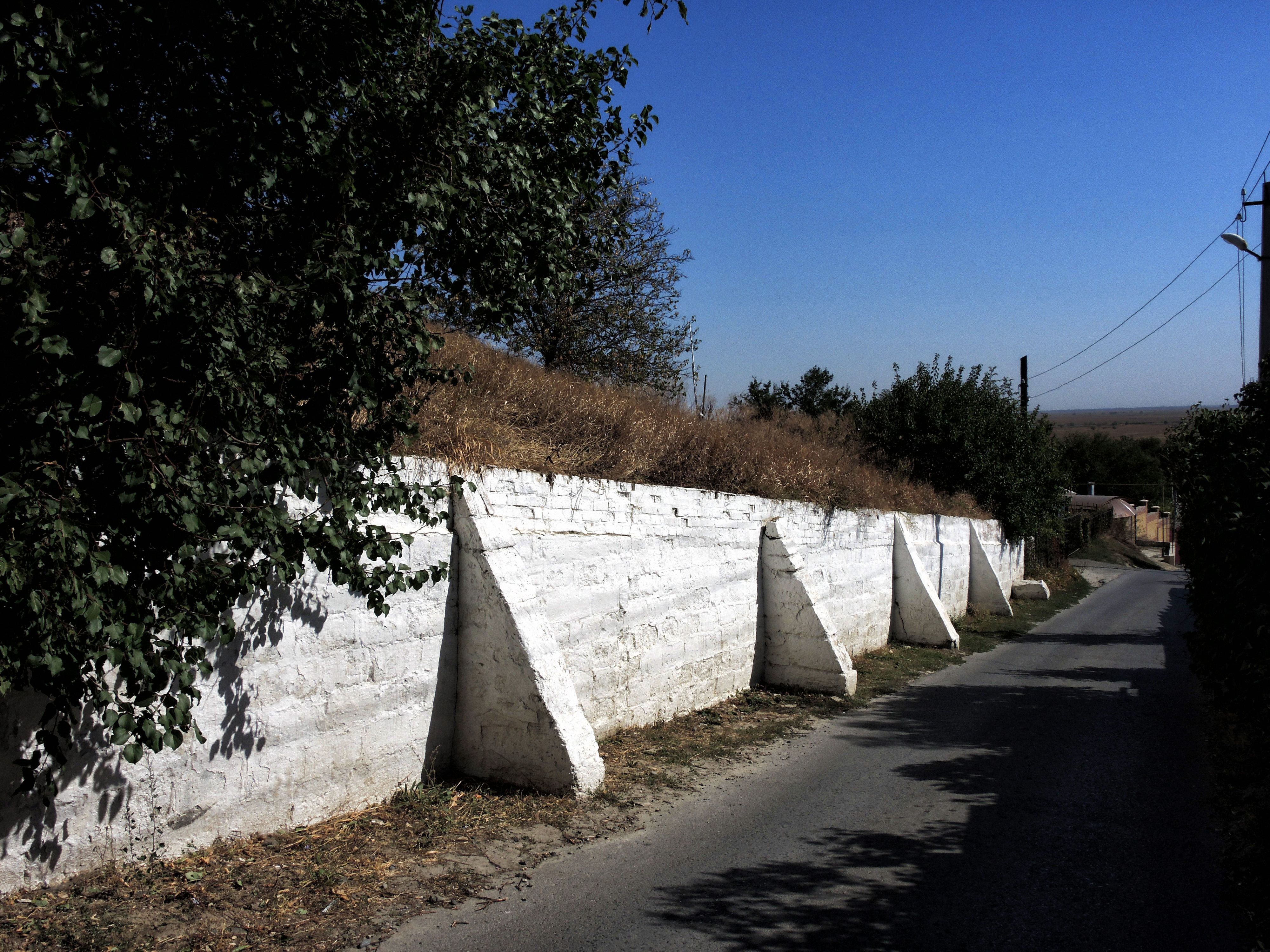 Таможенная застава, исторический центр города: Берданосовка, улица Грушевская, 8, Аксай, Аксайский район, Ростовская область